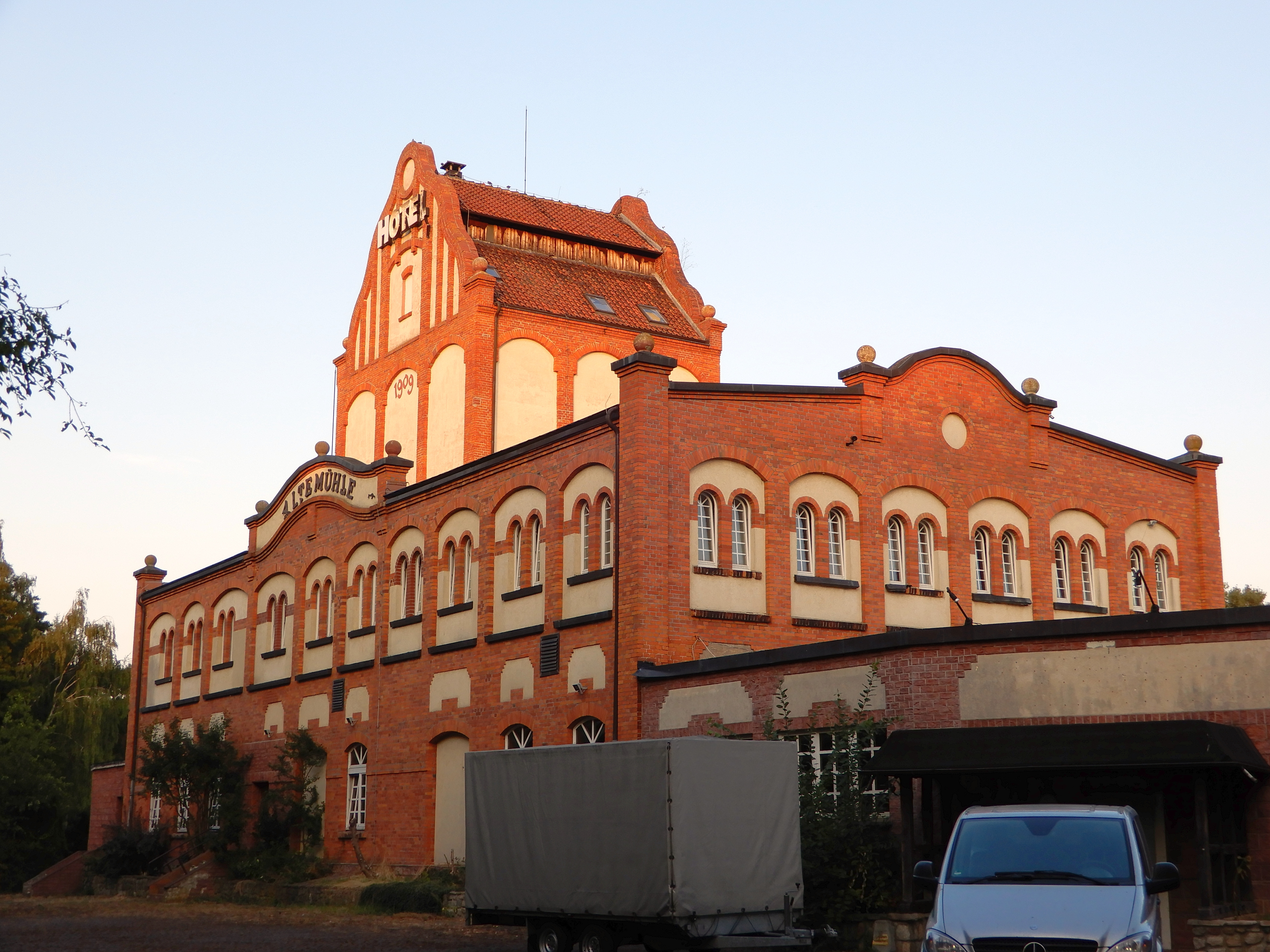 Neue Maasmühle Weddersleben, betrieben zuvor als Hotel Alte Mühle